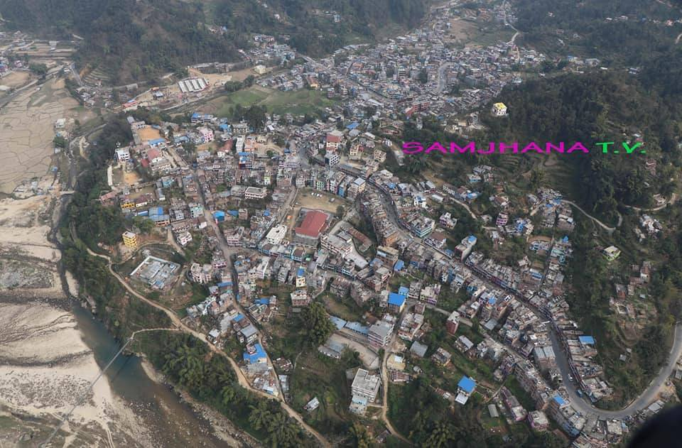 नेपाली: समग्र स्याङ्जा बजार ,एक झलक